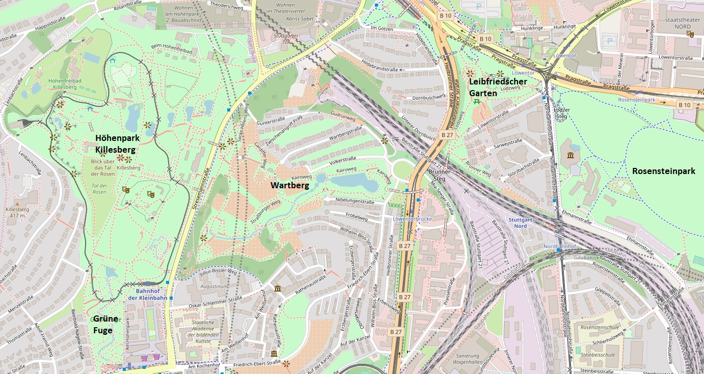 Lageplan Grünes U in Stuttgart, westlicher Teilvom Höhenpark Killesberg bis zum Rosensteinpark.